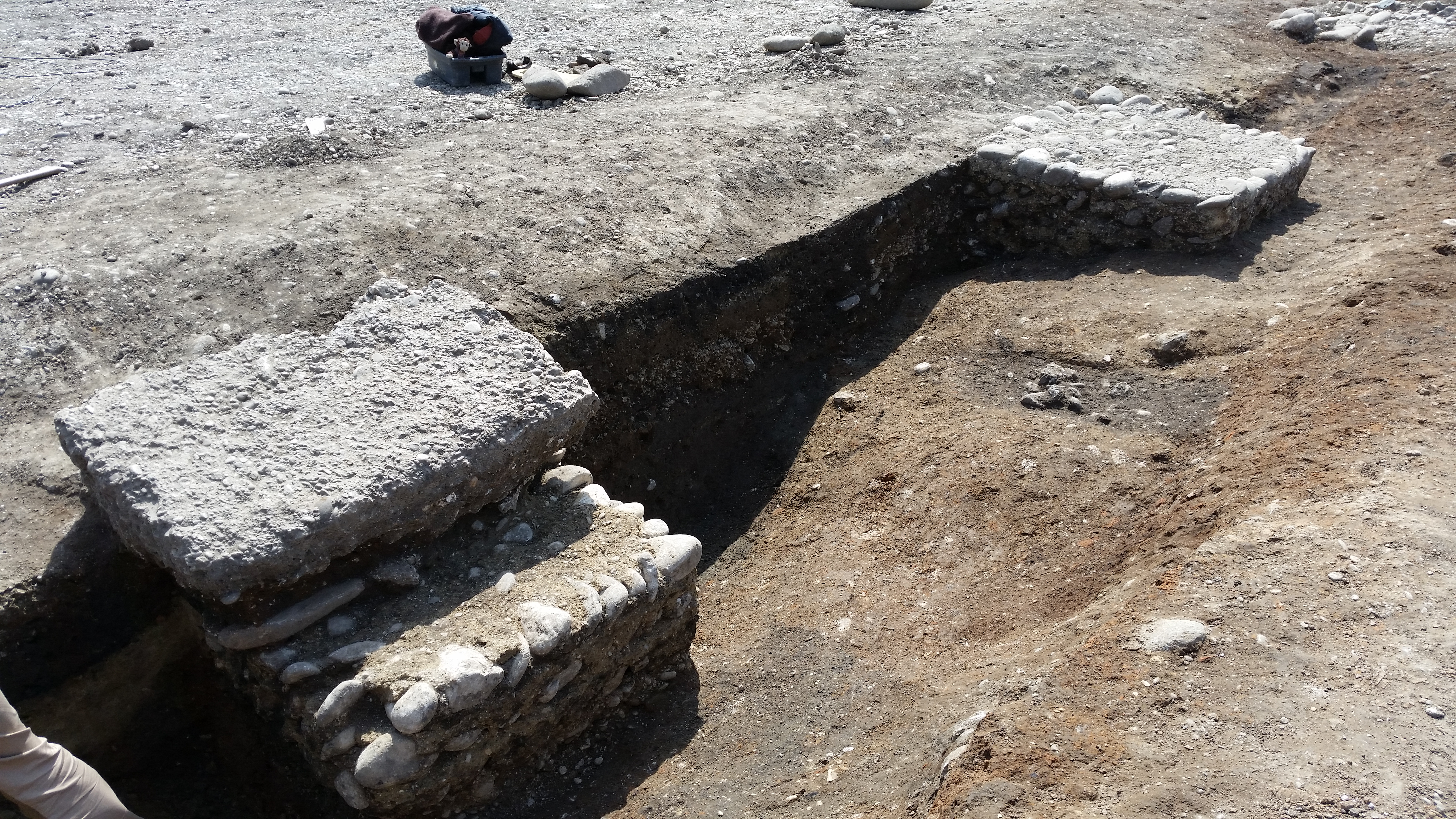 Ausgrabungsfund der archäologische Grabung 2015 am Werksgelände Enns - Mauerreste im Siedlungsraum des historischen Lauriacum